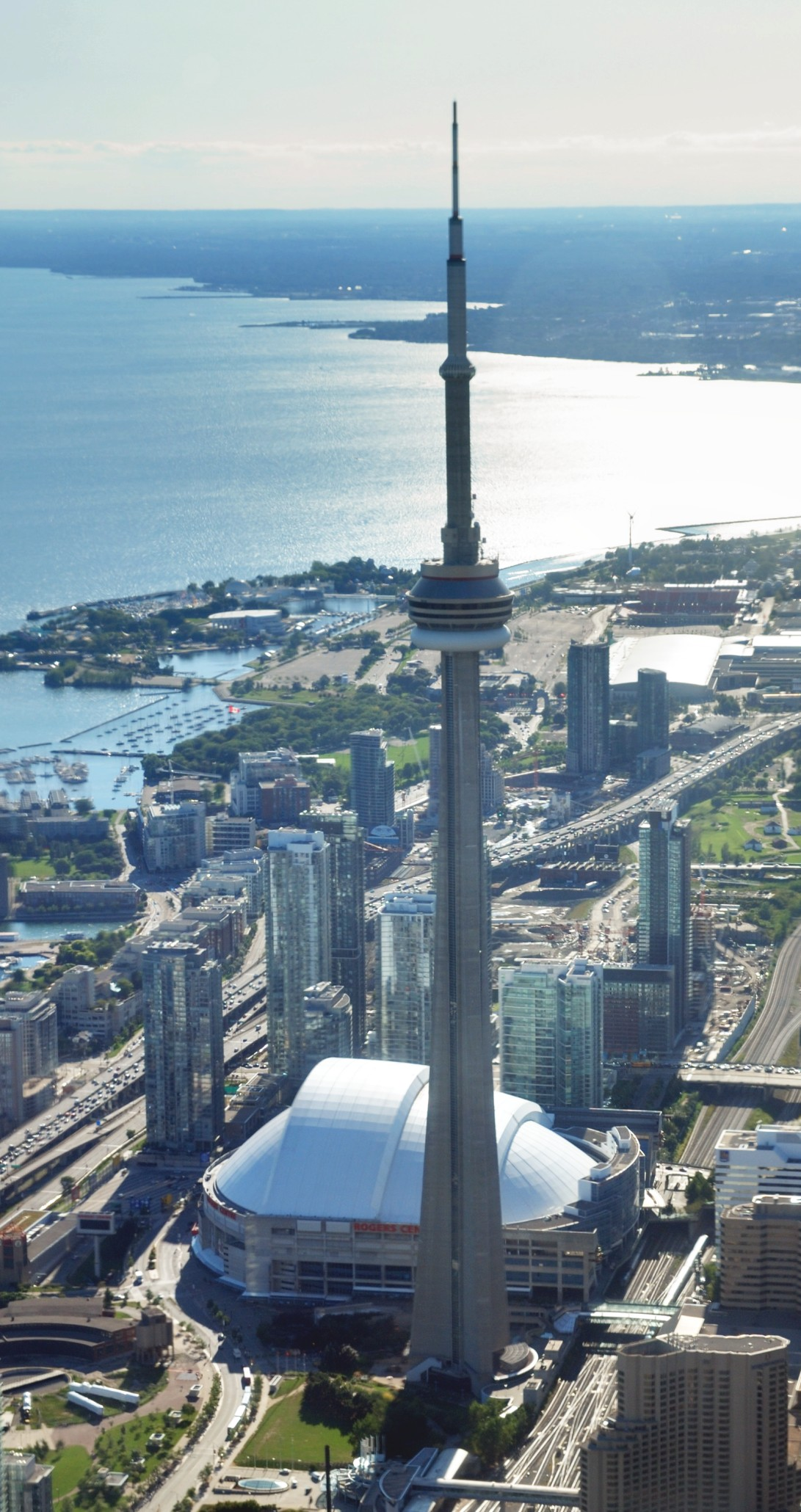 Toronto: CN Tower vom Hubschrauber aus